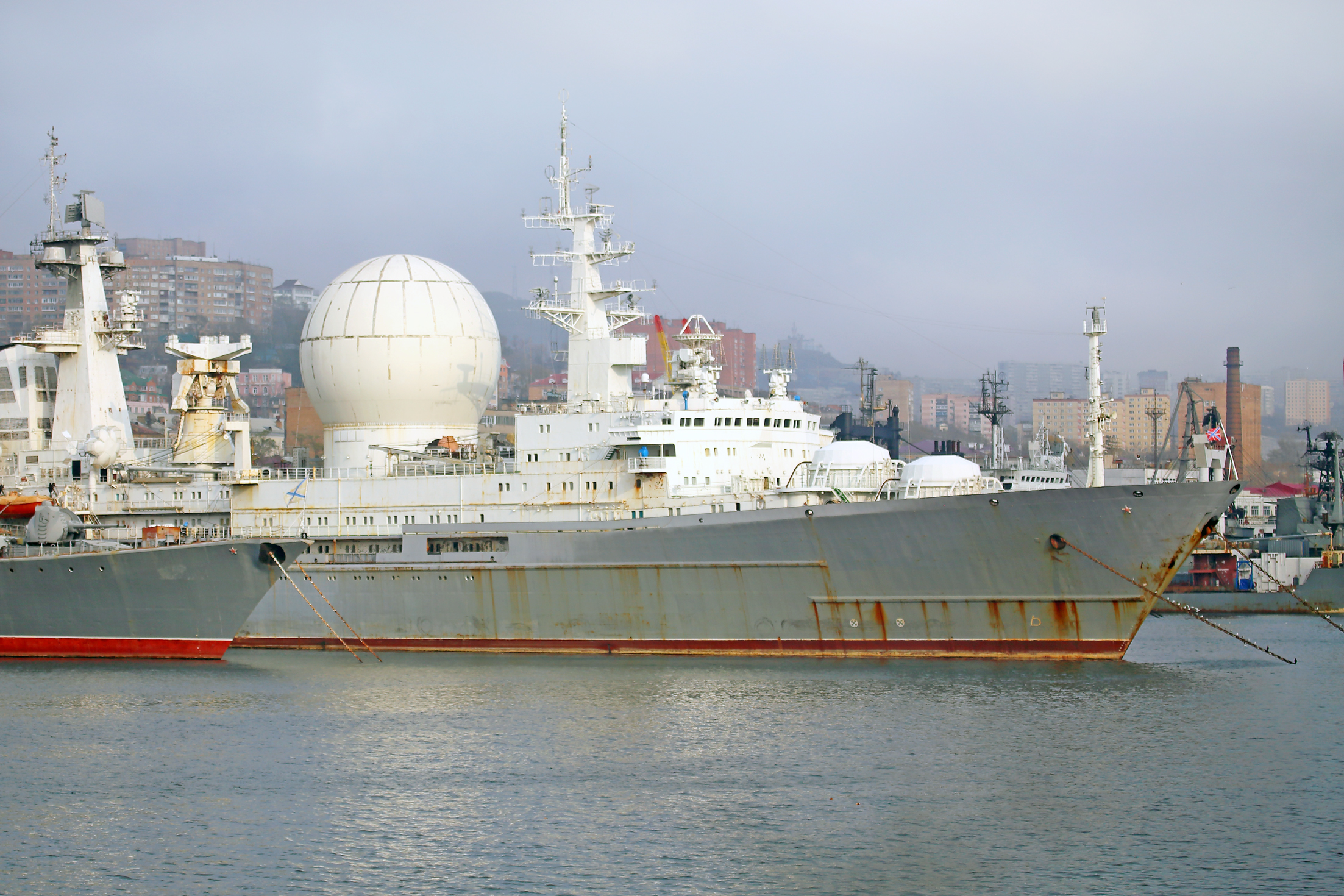 Маршал Крылов